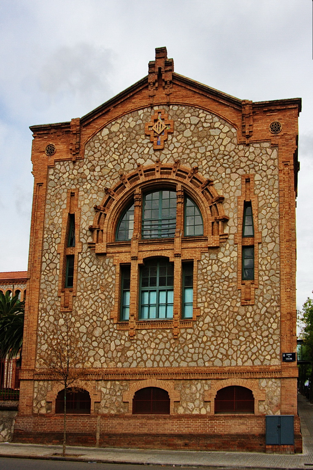 Palau d'Indústries (Escola Industrial de Terrassa), obra de 1904 de Lluís Muncunill. Està a Terrassa (Vallès Occidental-Catalunya). Vista d'un dels extrems de l'edifici lateral. Destaca l'ús decoratiu que fa amb els maons.